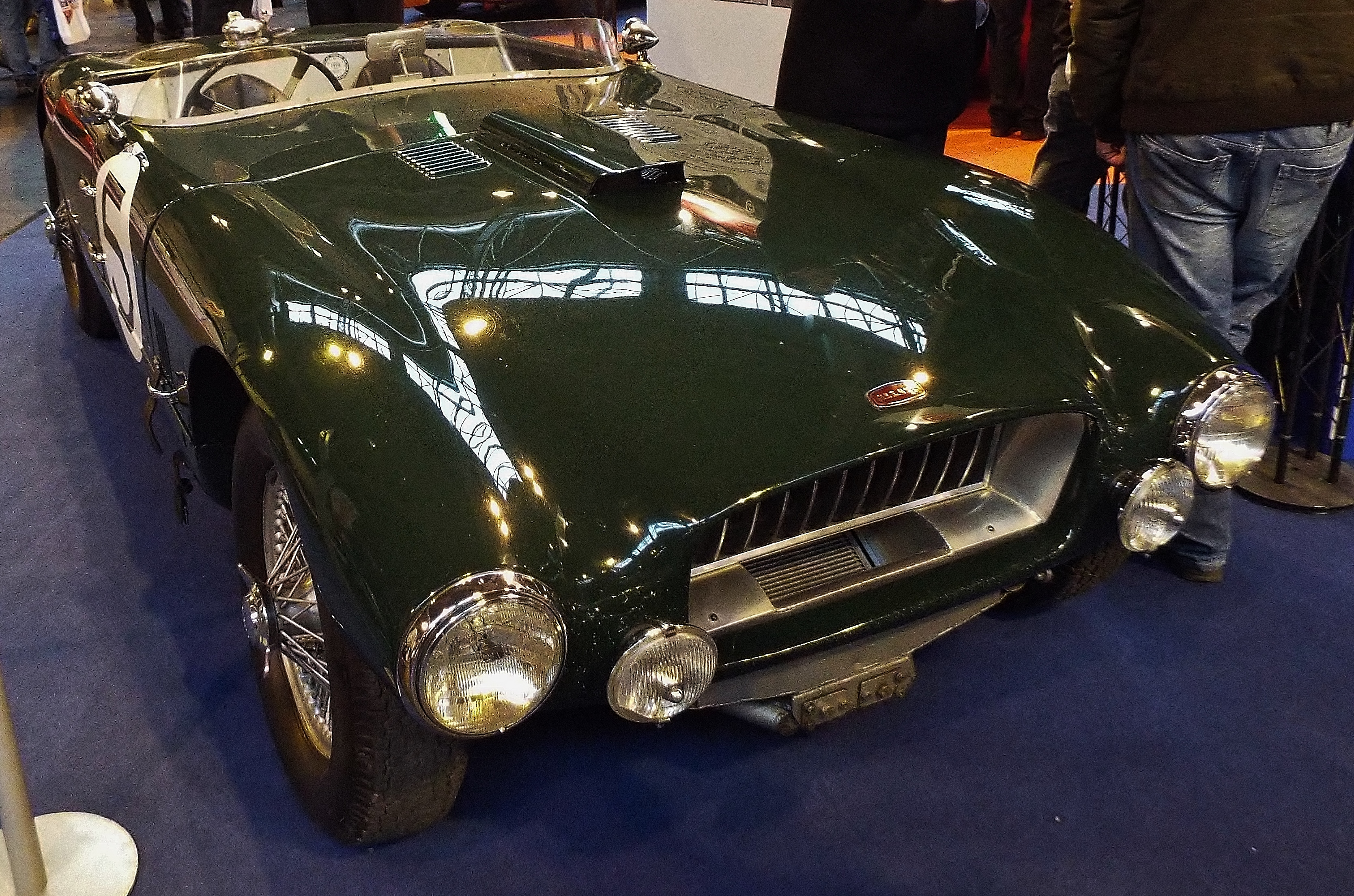 Allard JR